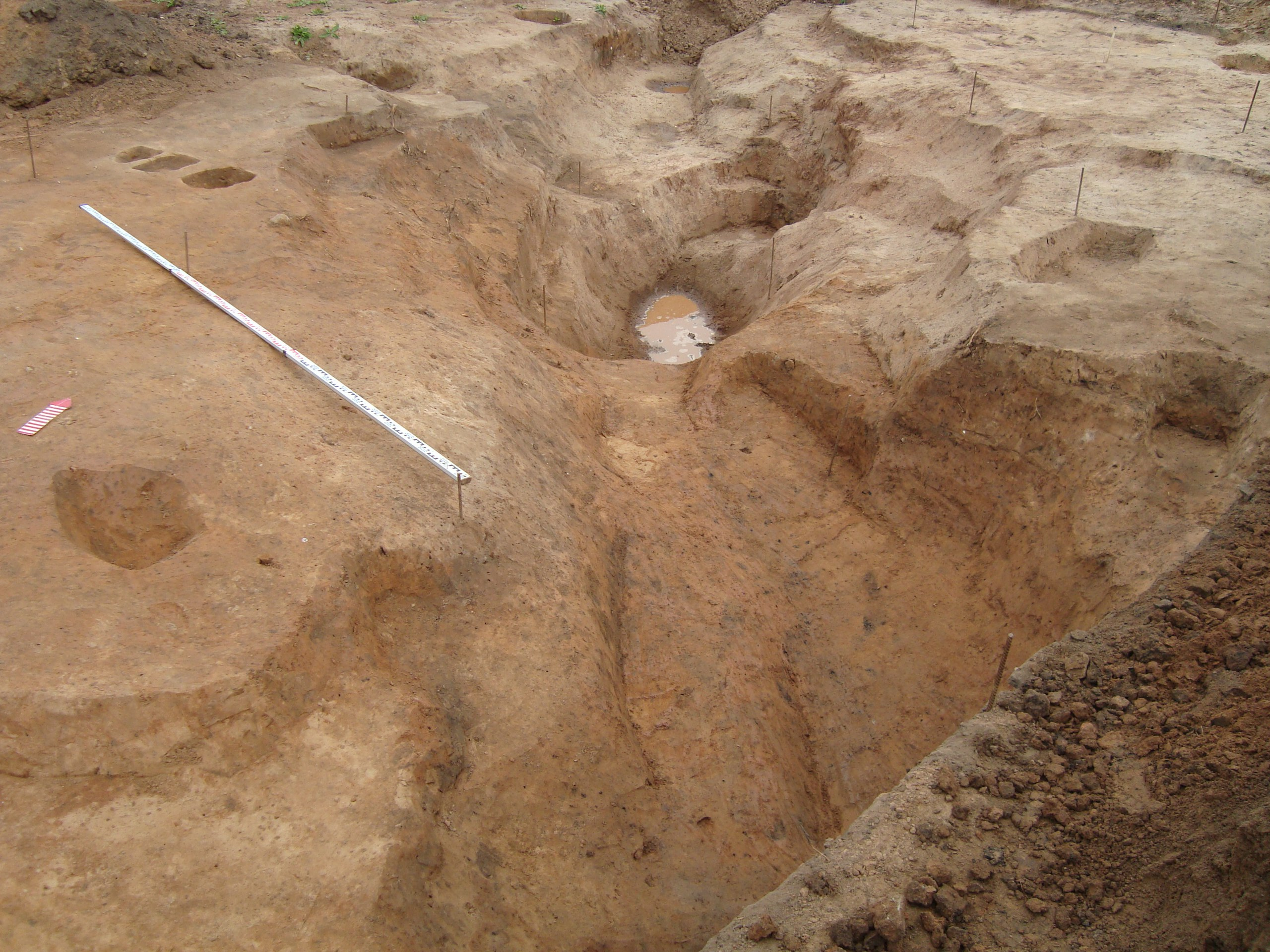 Фото рва городища Городище в раскопе 1 2011 года